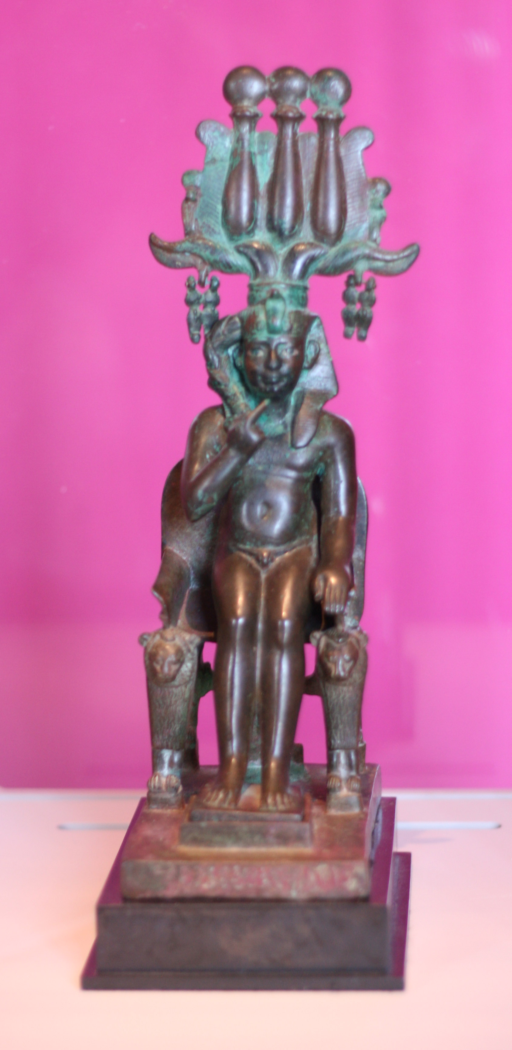 Statuette du dieu Somtous. Exposée au Château de Versailles.